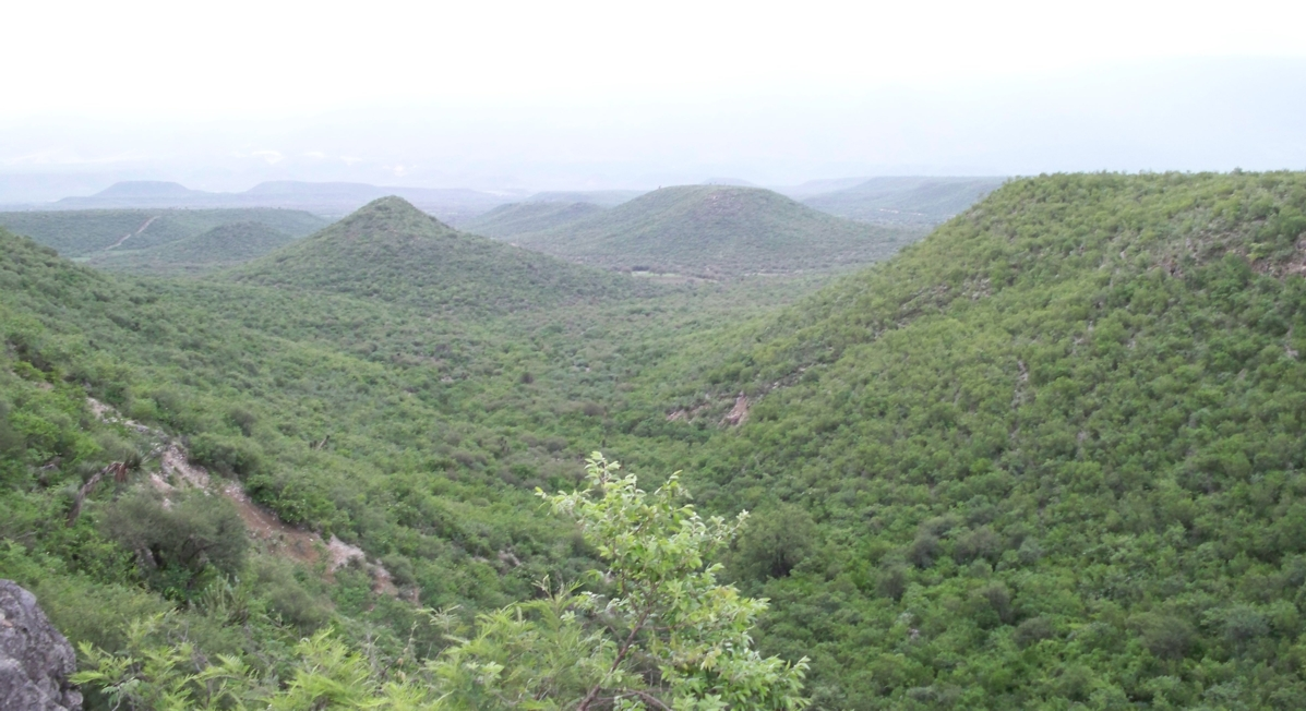 Vista panorámica del cerro del pilón. Tiene una simetría triangulár bastante cingular